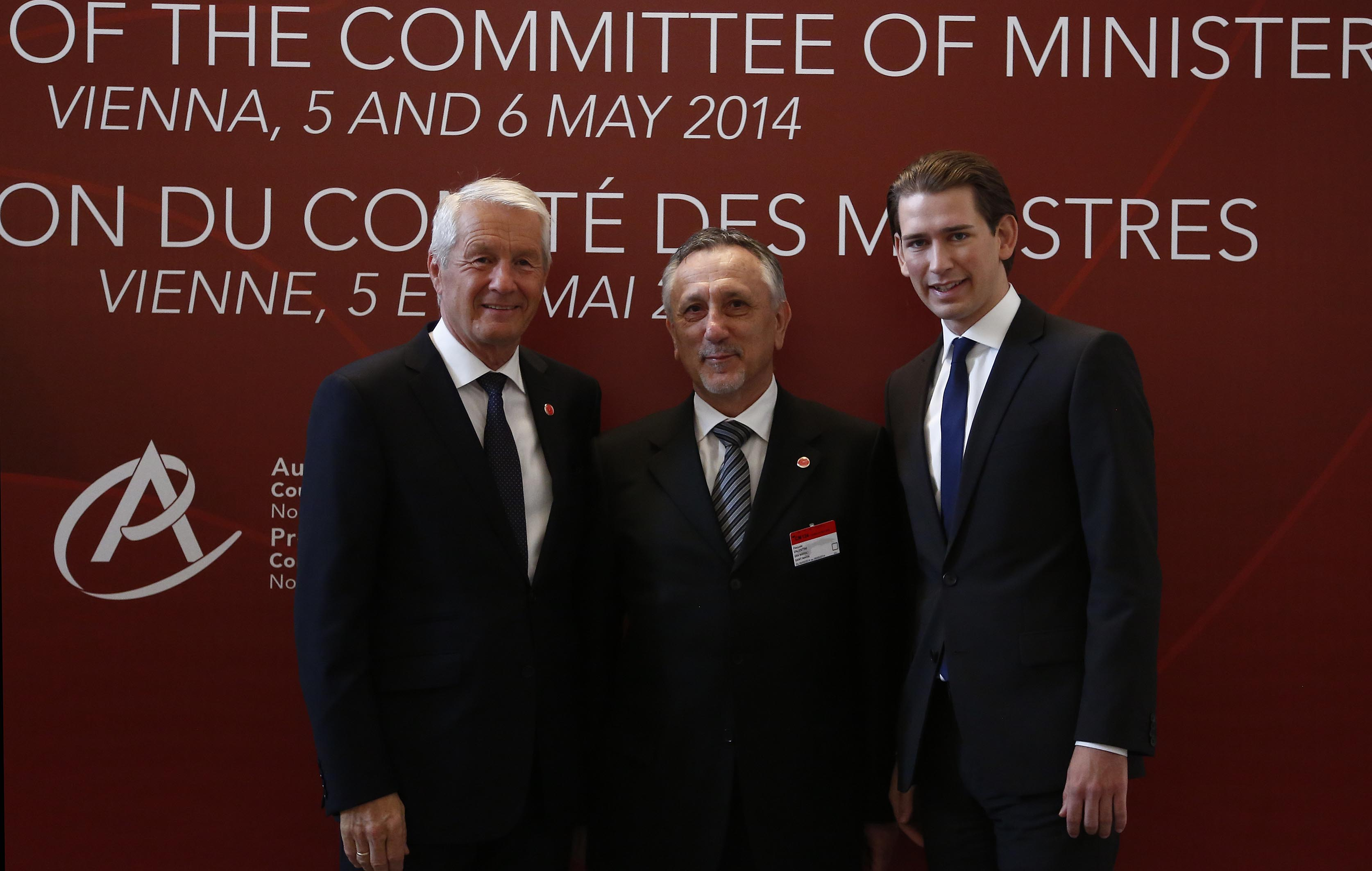 Secretary General of the Council of Europe Thorbjørn Jagland, Foreign minister of San Marino Pasquale Valtentini and Foreign minister of Austria Sebastian Kurz. 06.05.2014. Foto:Dragan Tatic